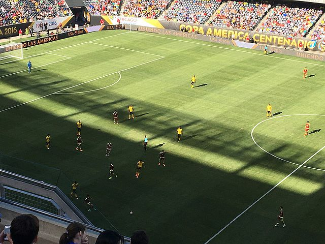 Venezuela-Jamaica Copa América Centenario 2016. Soldier Field, Chicago.